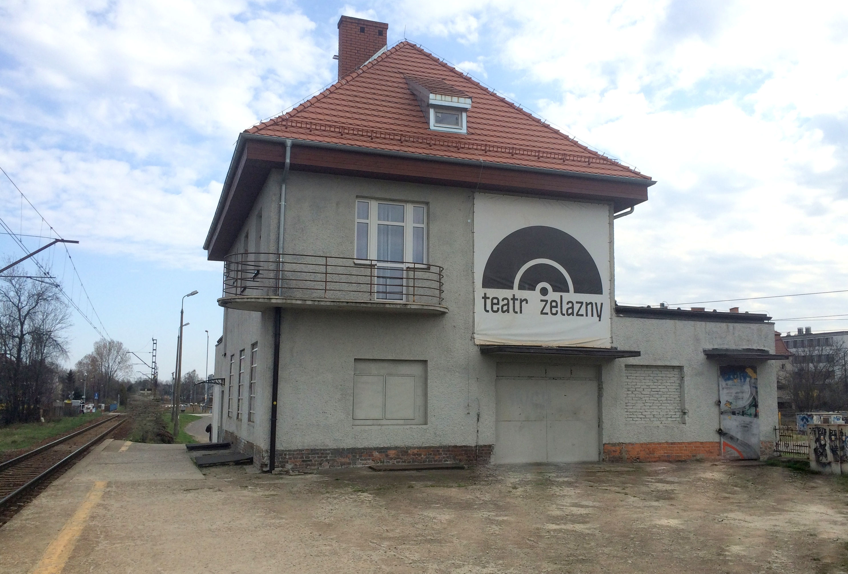 Teatr Żelazny